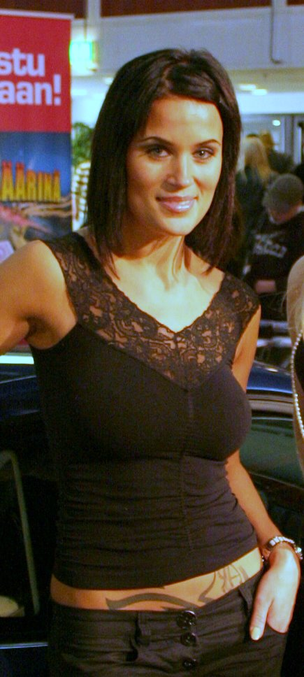 Martina Aitolehti-Eerikäinen in American Car Show 2007, Helsinki